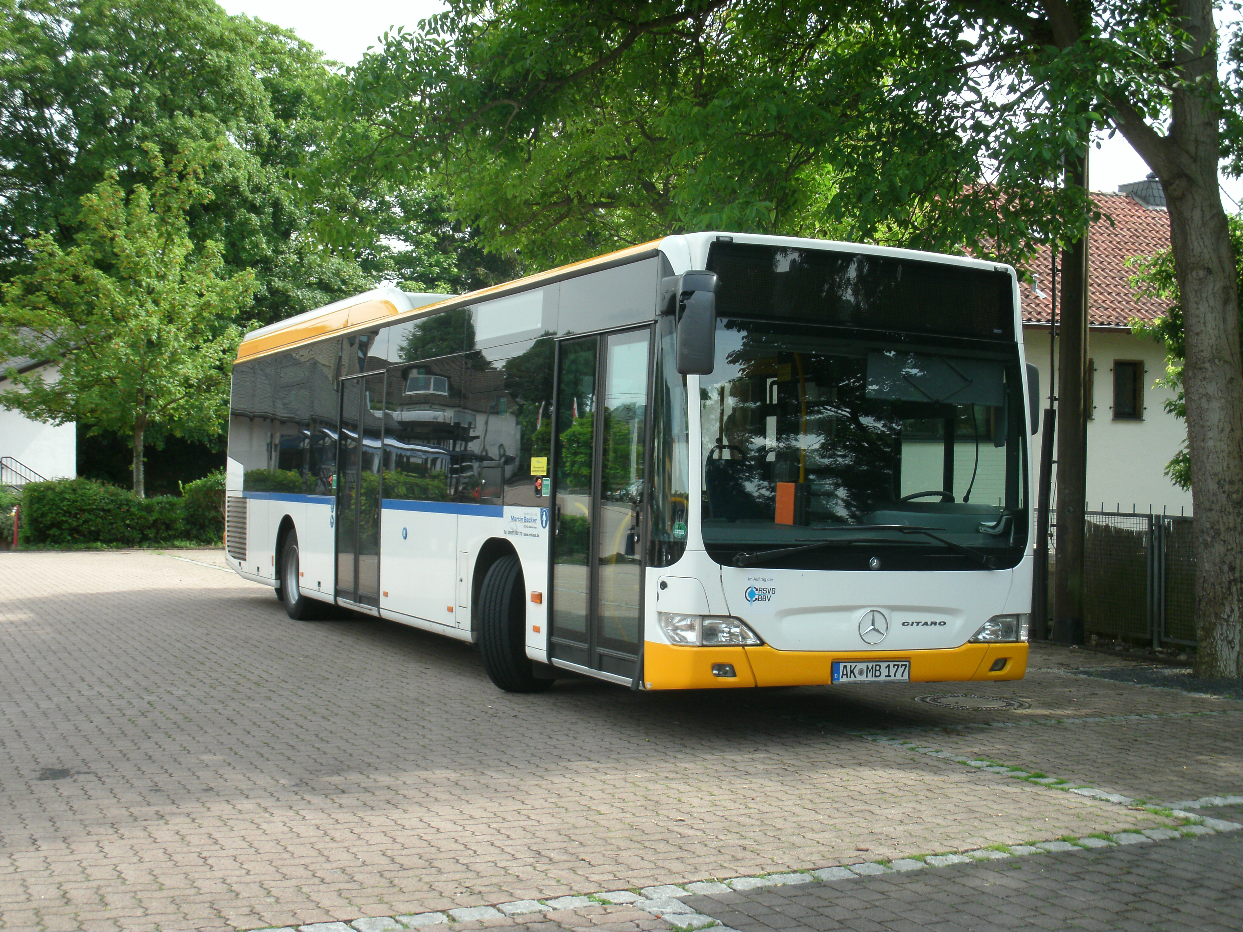 Linienbus (Mercedes-Benz Citaro) des Verkehrsbetriebes Martin Becker, seit 2002 Teil der Rhenus-Veniro Gruppe, als Linie 562 in Asbach (Westerwald), Haltestelle Markt